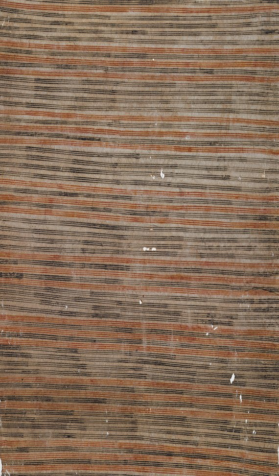 Hawaiian kapa